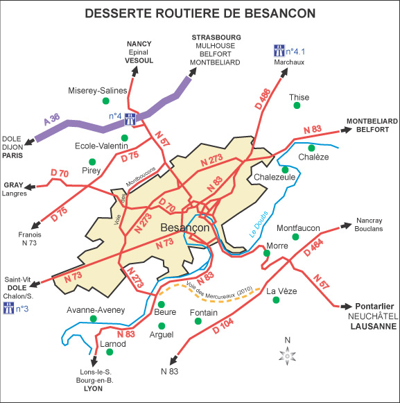 Carte du réseau routier de Besançon